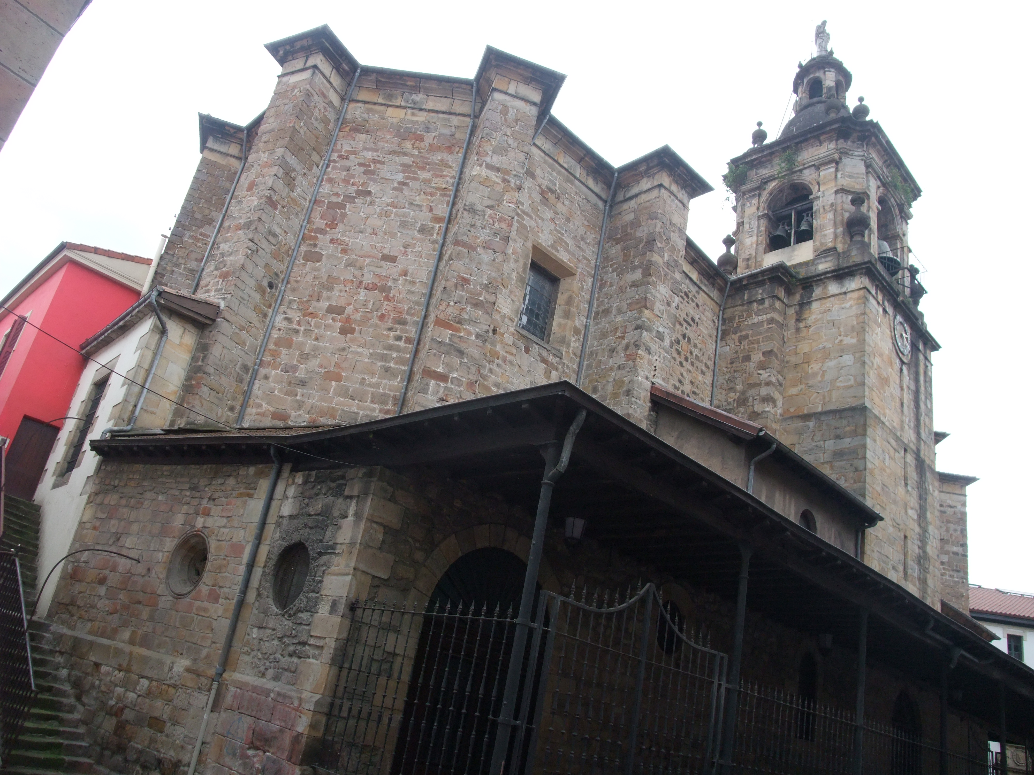 Ordizia (Guipúzcoa)-Iglesia de Santa María de la Asunción-1